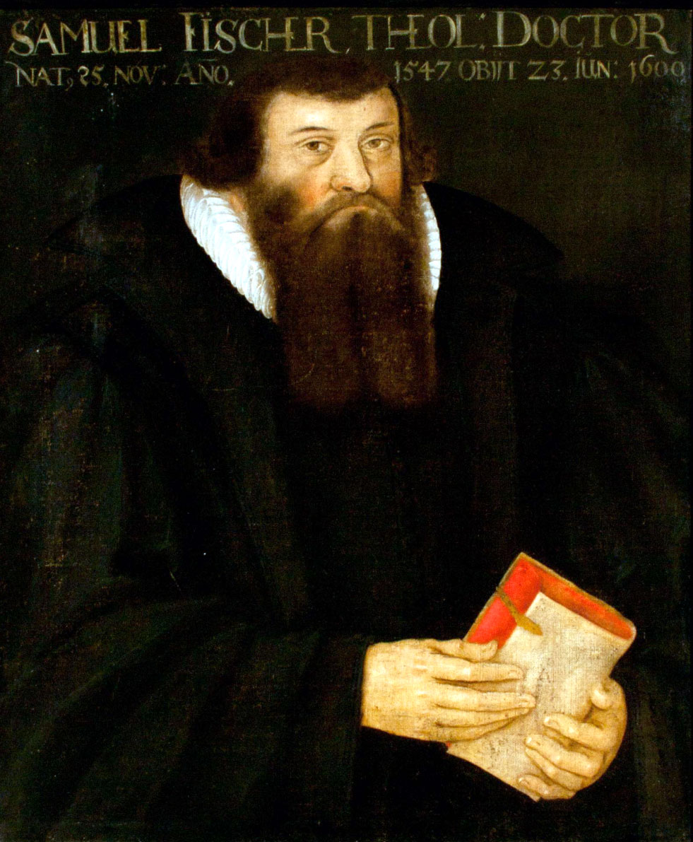 Samuel Fischer (1547-1600) deutscher evangelischer Theologe